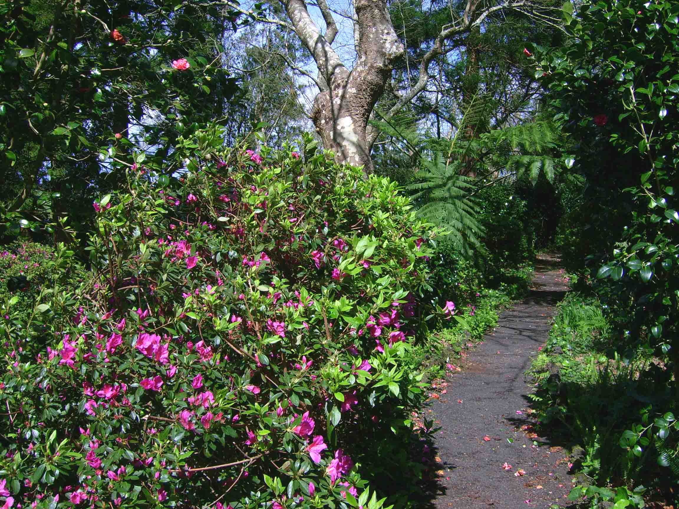 Caminhos no Parque Florestal das Sete Fontes, ilha de São Jorge, Açores, Portugal